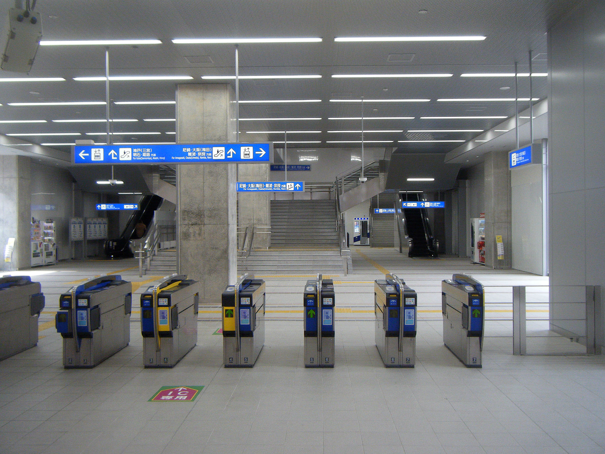 阪神鳴尾駅1F構内 上り線高架化初日